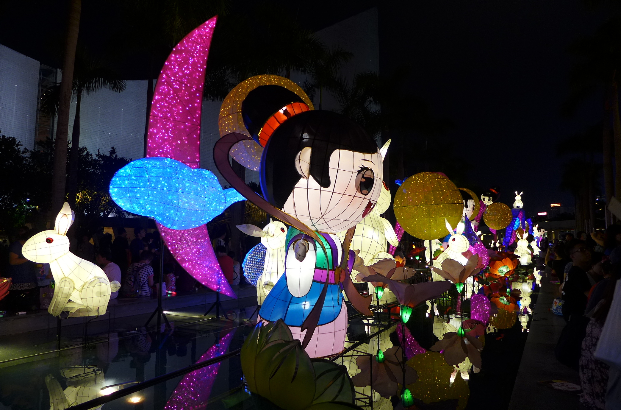 Cultural Centre Mid Autumn Festival Decoration